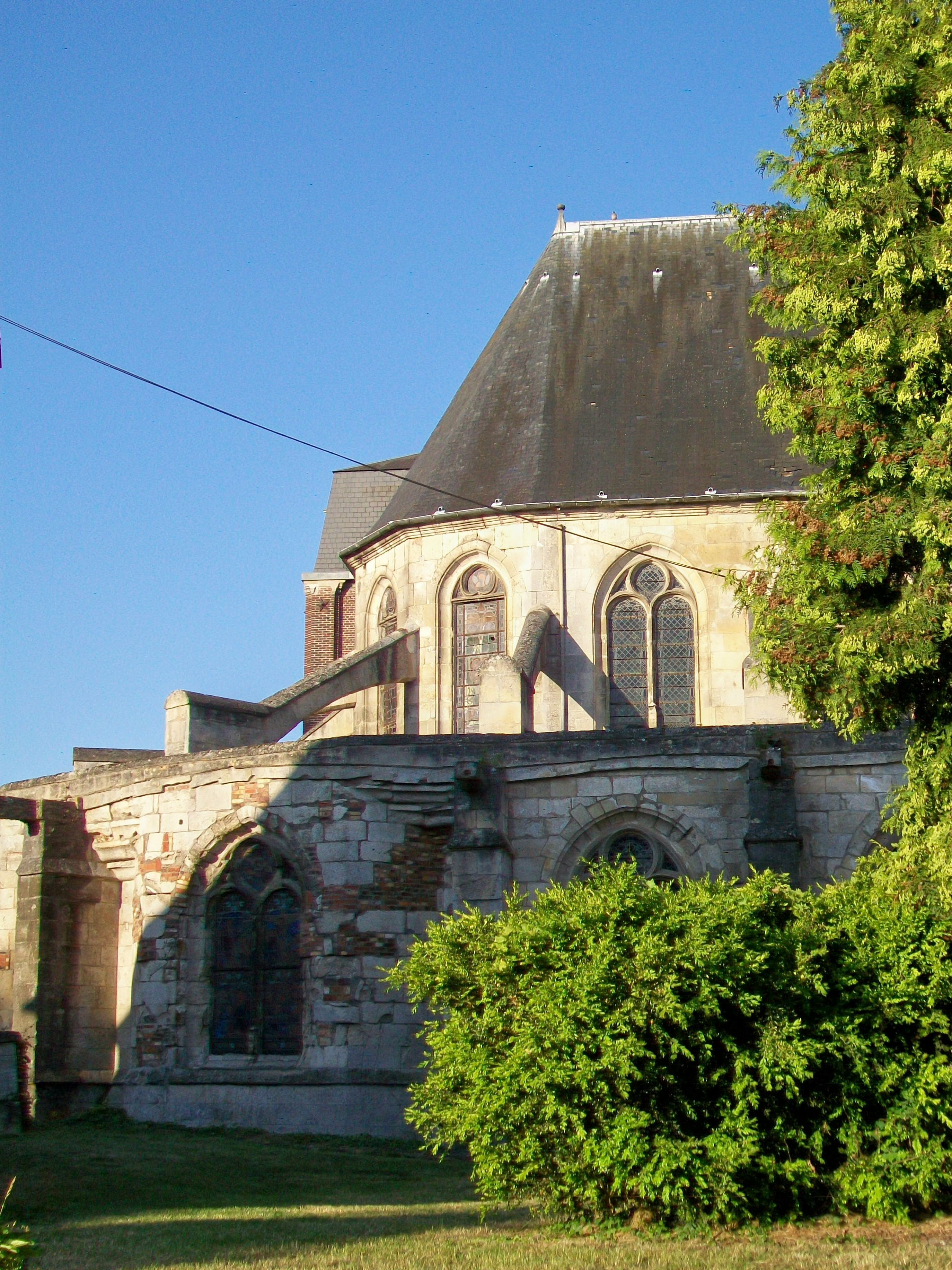 Le chœuer de l'église Sainte-Maxence, depuis le nord.